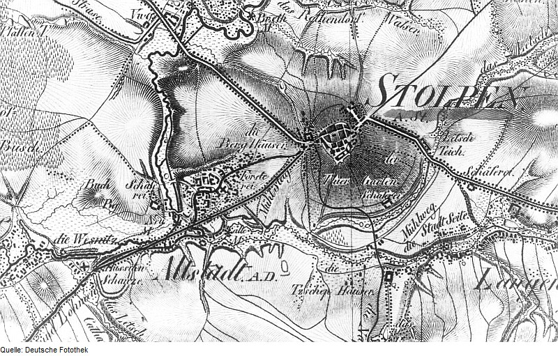 Original image description from the Deutsche Fotothek Stolpen. Oberreit, Sect. Stolpen, 1821/22